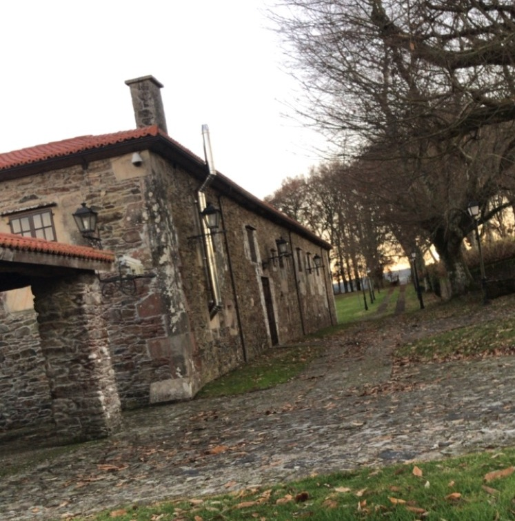 Pazo de Des